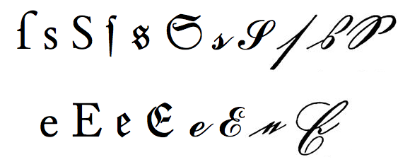 Die Buchstaben "S" and "E" als Klein- und Großbuchstaben in a) Antiqua Druckschrift (Cardo, basiert auf Bembo) b) Antiqua Schreibschrift (Commercial Script BT) c) Kleist-Fraktur d) Deutsche Kurrentschrift (aus: Image:Deutsche Kurrentschrift.jpg). Beim S sind Langes s und rundes s abgebildet. Verwendet in Antiqua-Fraktur-Streit zur Illustration des Hauptarguments der Reformer: Zweischriftigkeit bedeutet doppelten Lernaufwand.